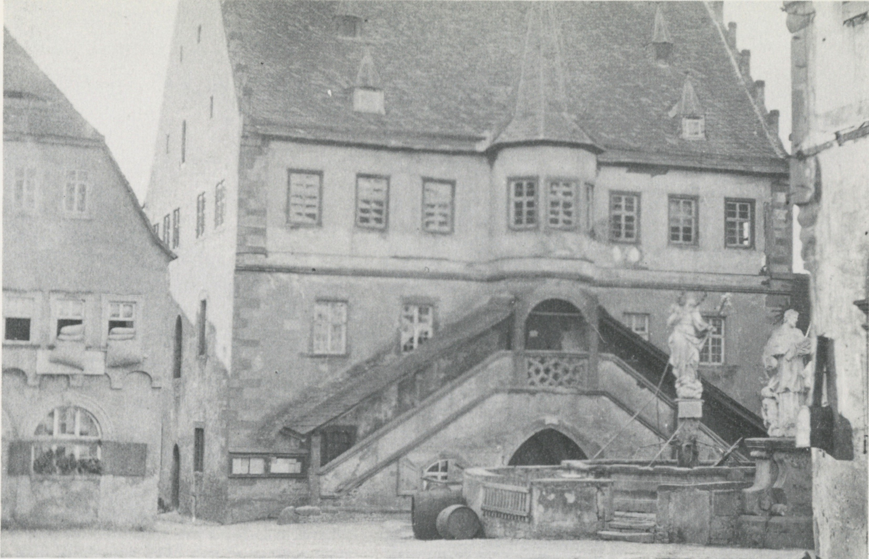 Fotografie des Volkacher Rathauses vor 1880. Mit gedecktem Treppenaufgang, Marktbrunnen mit Marienfigur und Nepomukstatue, später auf Mainbrücke von 1892.